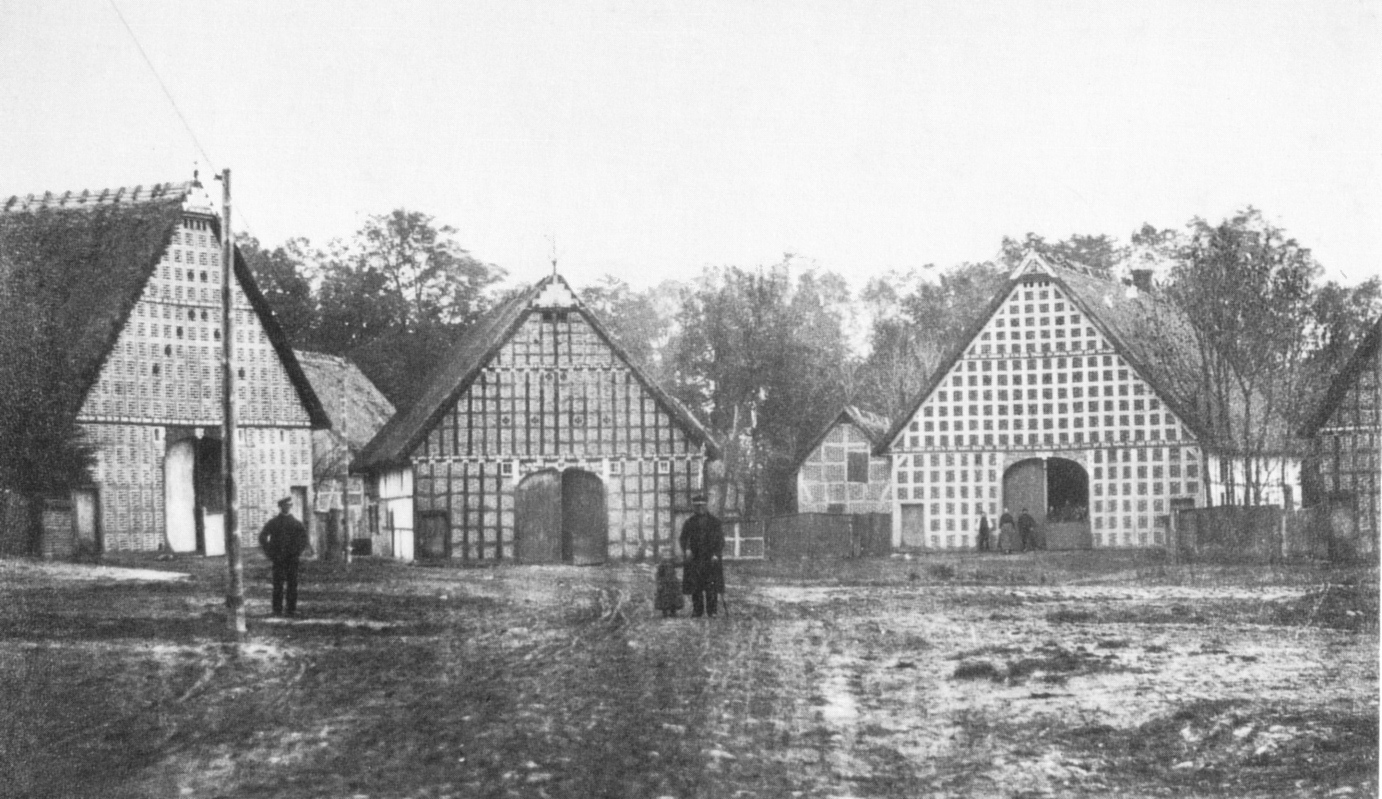 Lensian